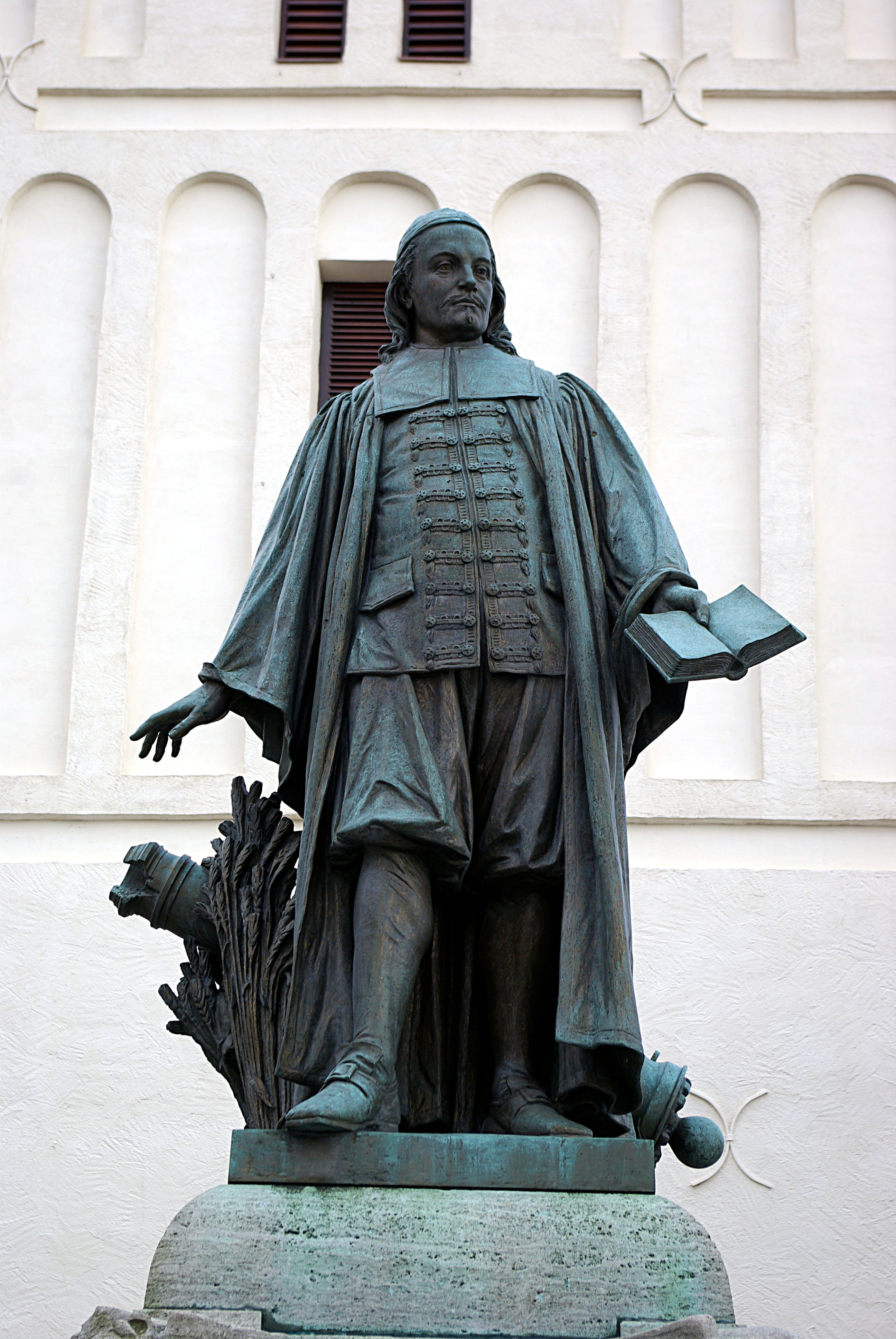 Lübben (Spreewald) in Brandenburg. Das Denkmal von Paul Gerhardt steht in Lübben vor der Kirche am Marktplatz und ist denkmalgeschützt.